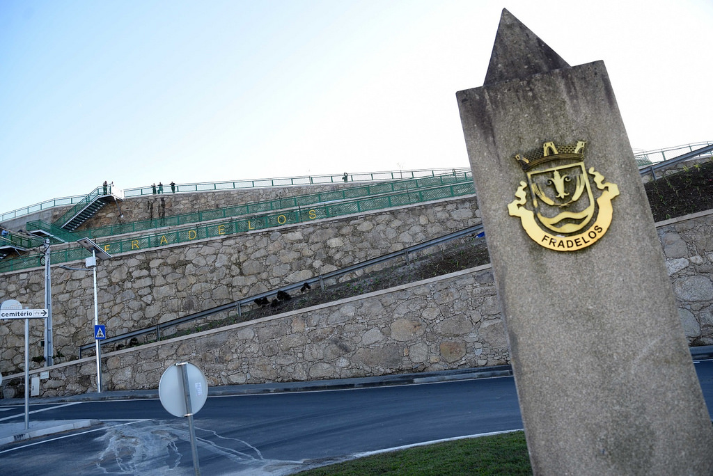 Paisagem da maior estrada da freguesia, o Monte do Cemitério possui o Parque das Tílias, a mais recente obra da freguesia, que custou 110 mil euros